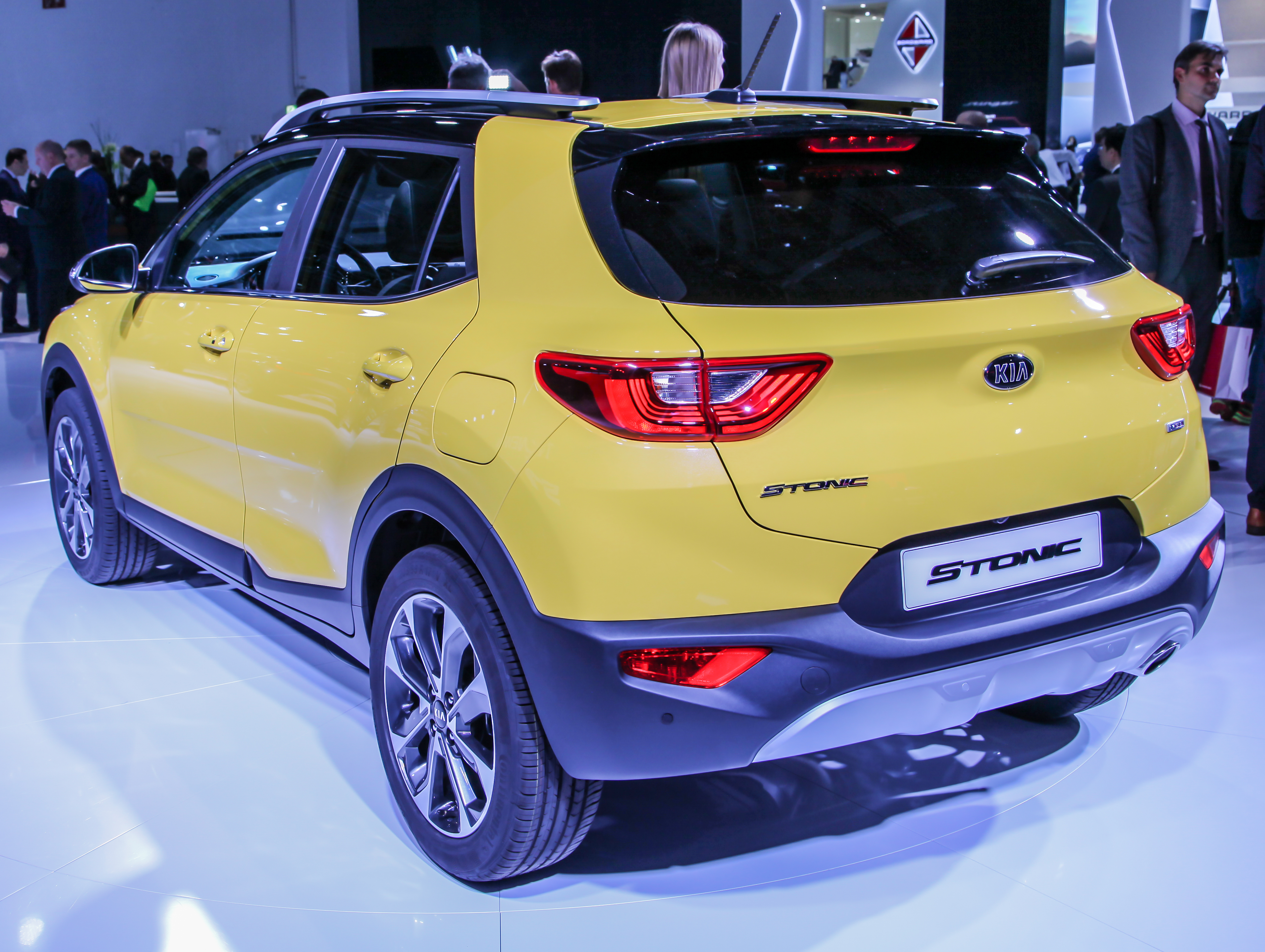 Kia Stonic